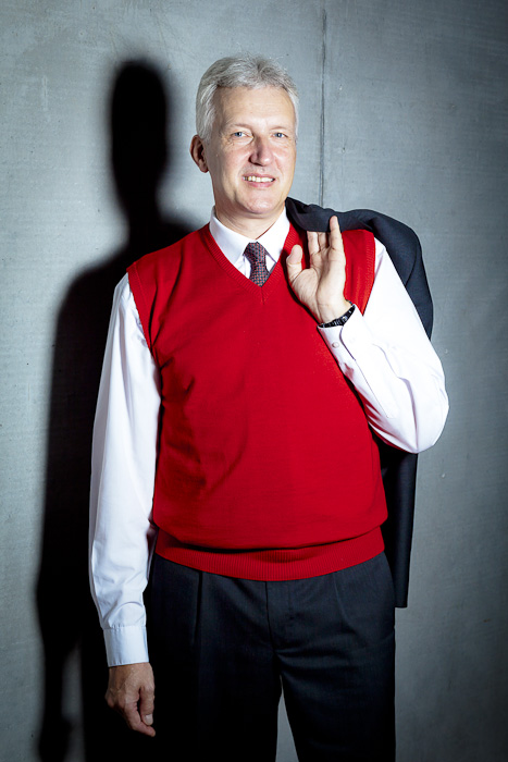 Petr Konvalinka, český materiálový inženýr a rektor Českého vysokého učení technického.